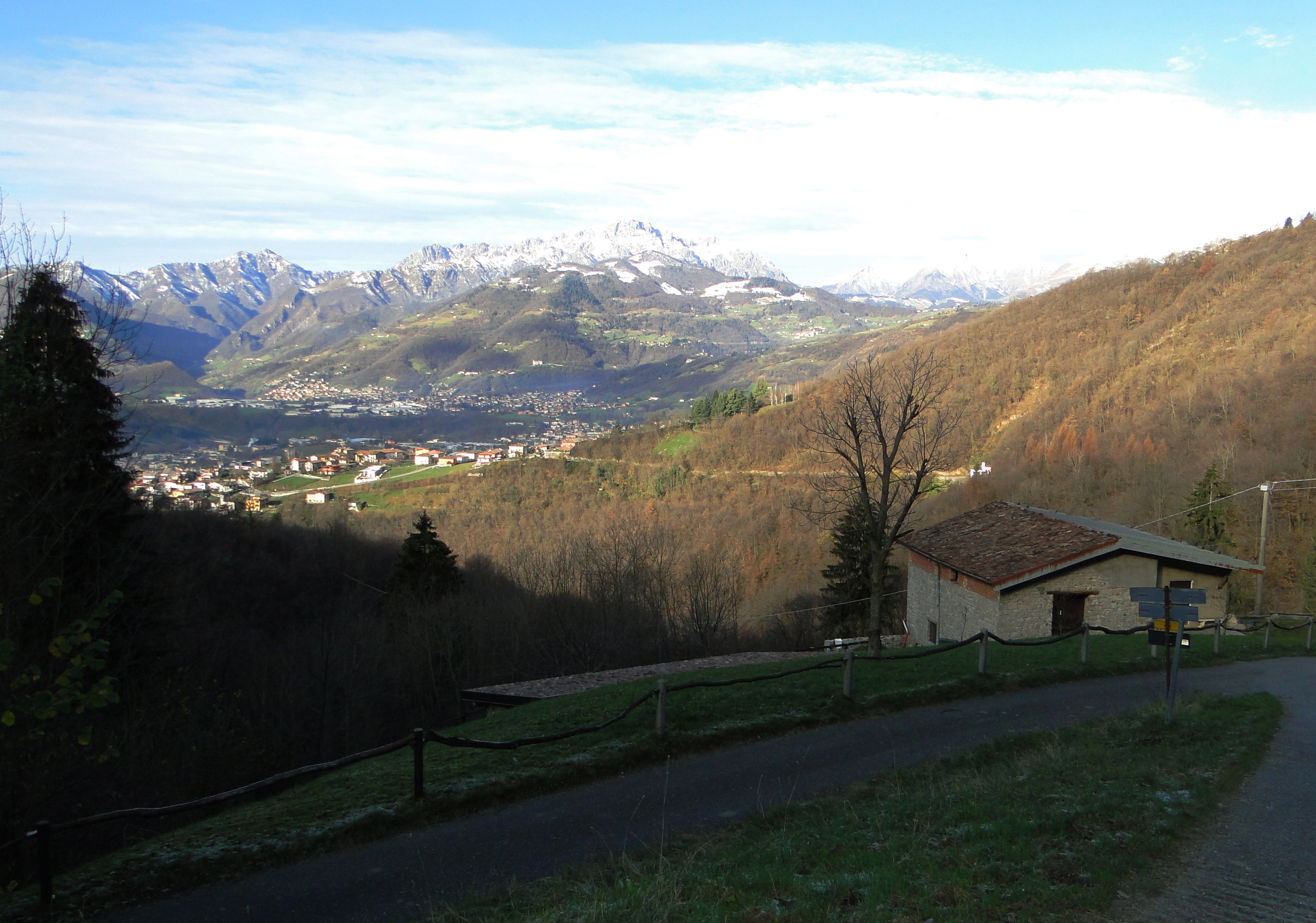 Panorama dalla val Boala su Peia (BG). Italy